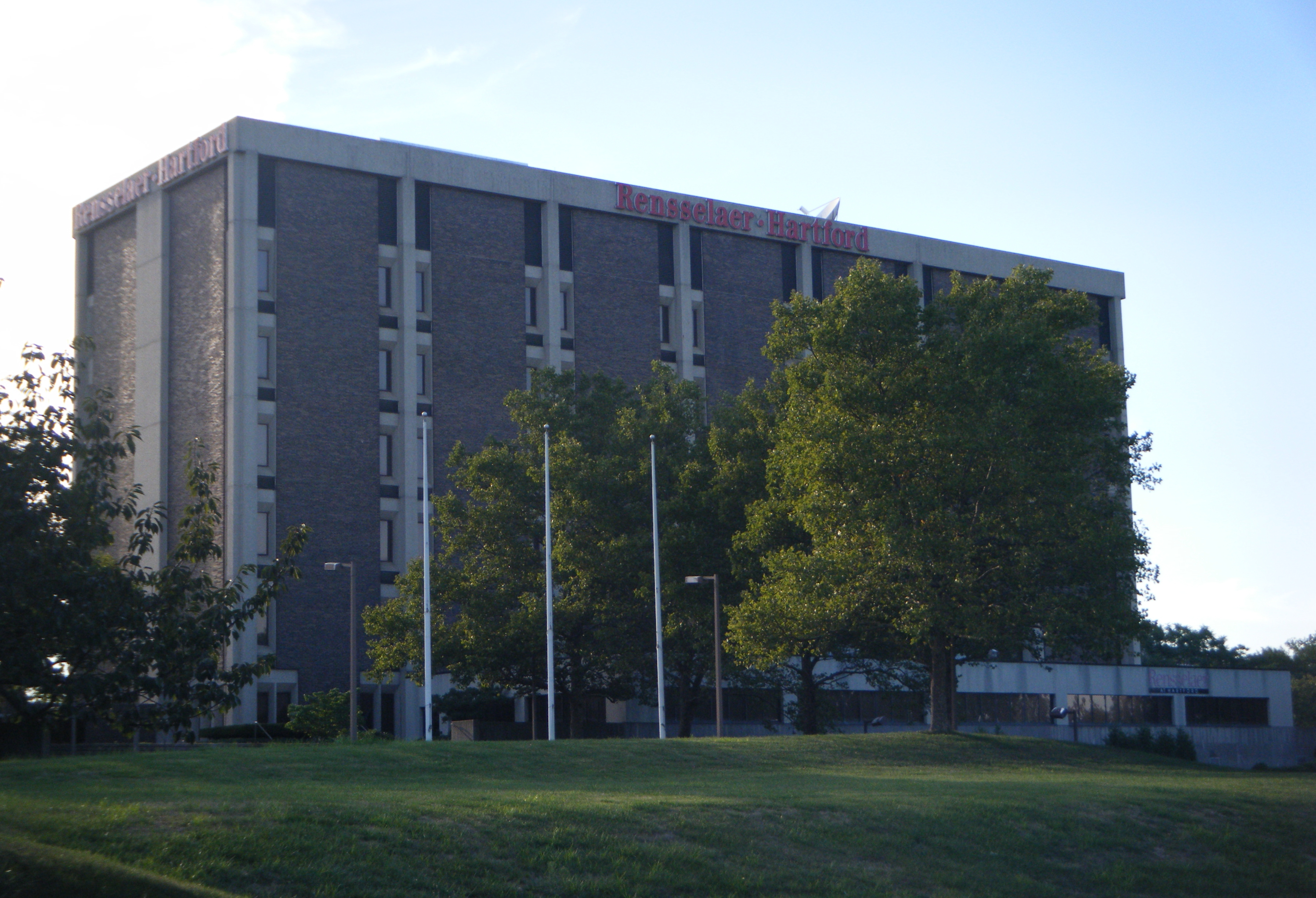 Rensselaer at Hartford building in Hartford, CT.